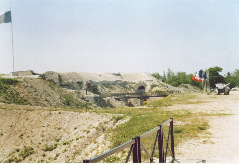 Fort de la Pompelle kehlseite